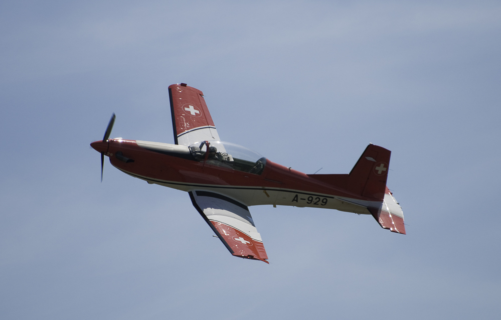 20100626-_DSC7448